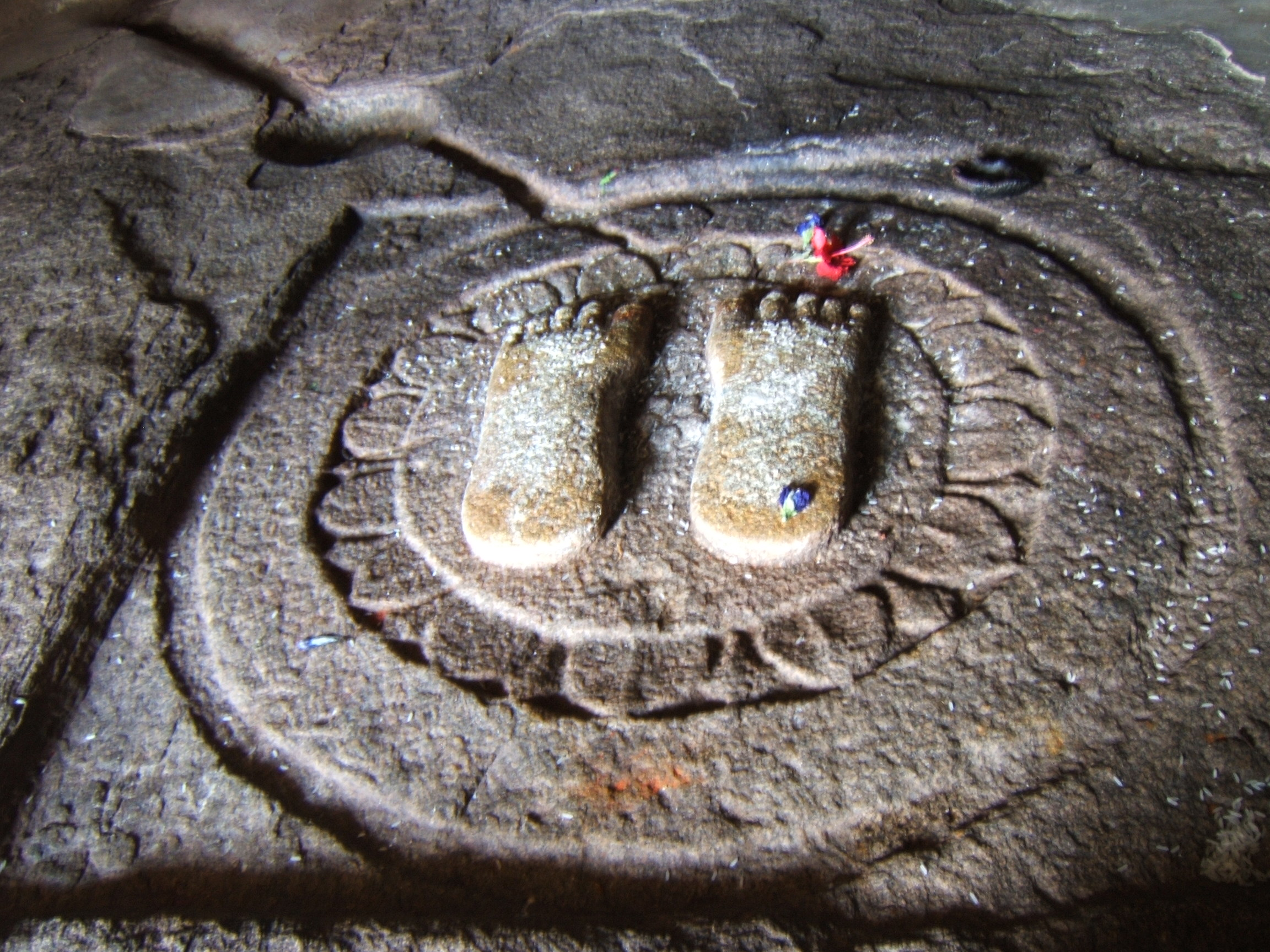 Bhadrabahu Cave, Shravanabelagola, Karnataka, India